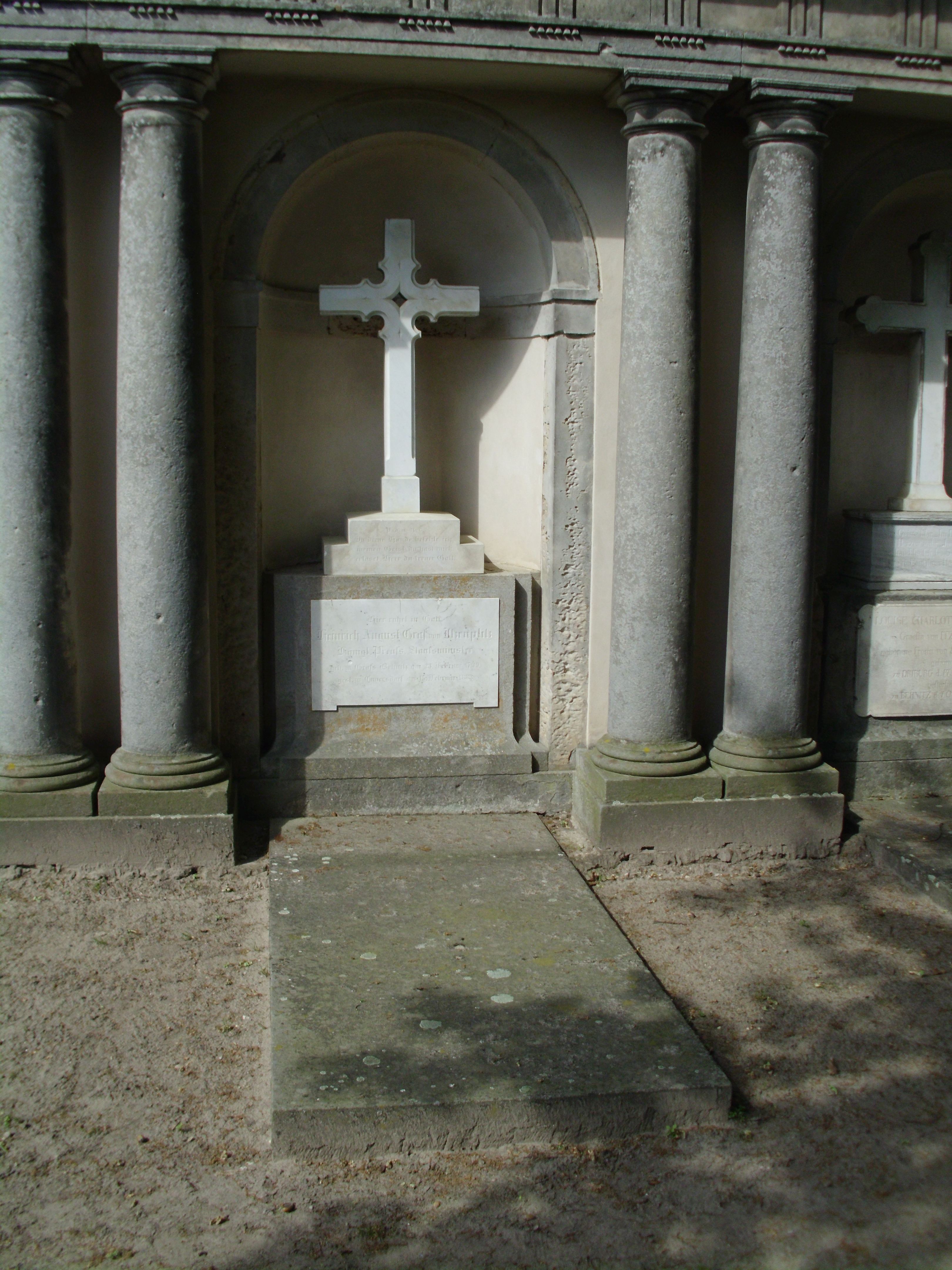 Graf Heinrich Friedrich August von Itzenplitz (* 23. Februar 1799 in Groß Behnitz bei Nauen; † 15. Februar 1883 auf seinem Gut Kunersdorf bei Wriezen) war ein preussischer Minister, Naturwissenschaftler und Jurist.